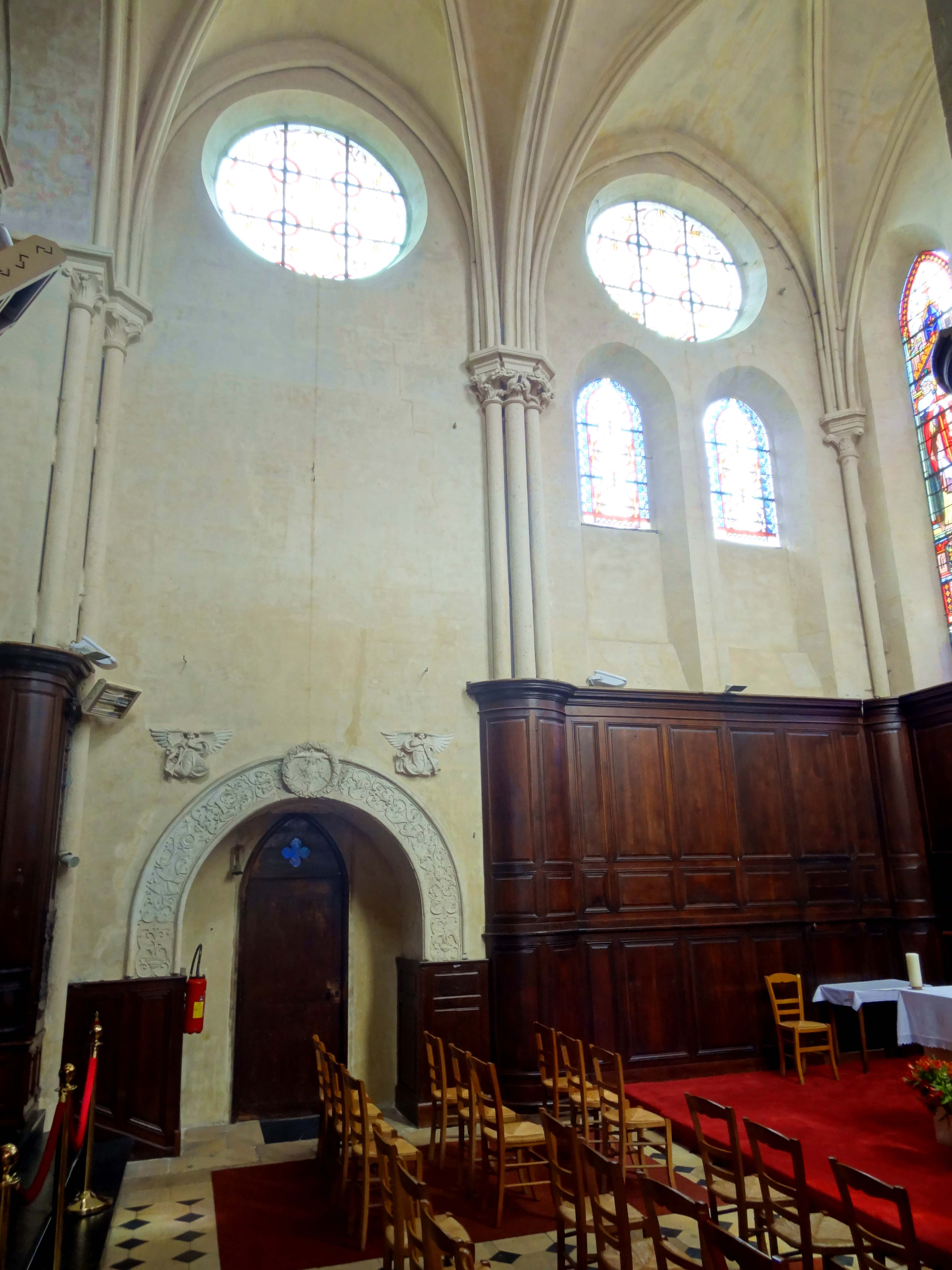 Intérieur de l'église - voir titre.